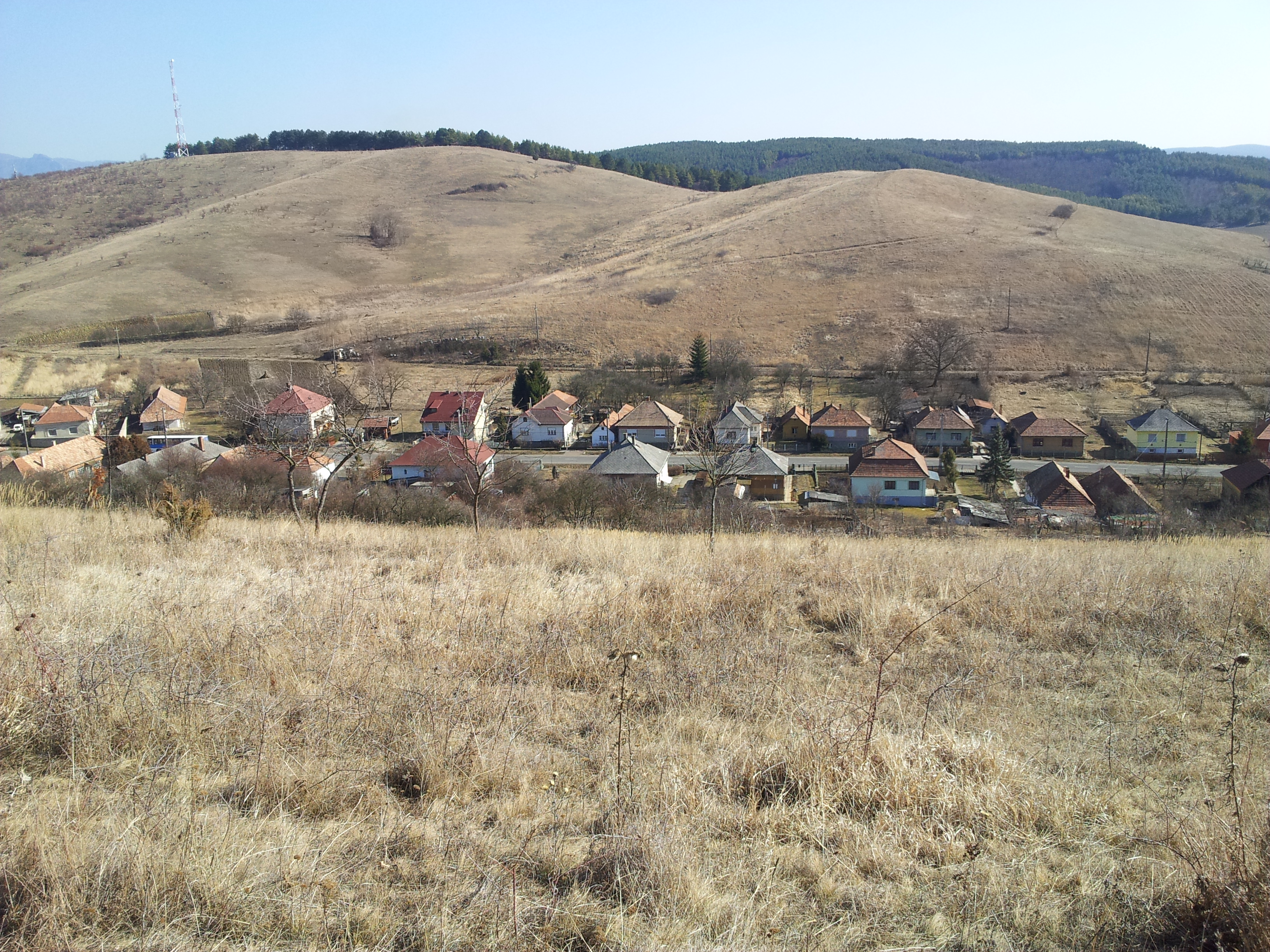 Szúcsi március. 8